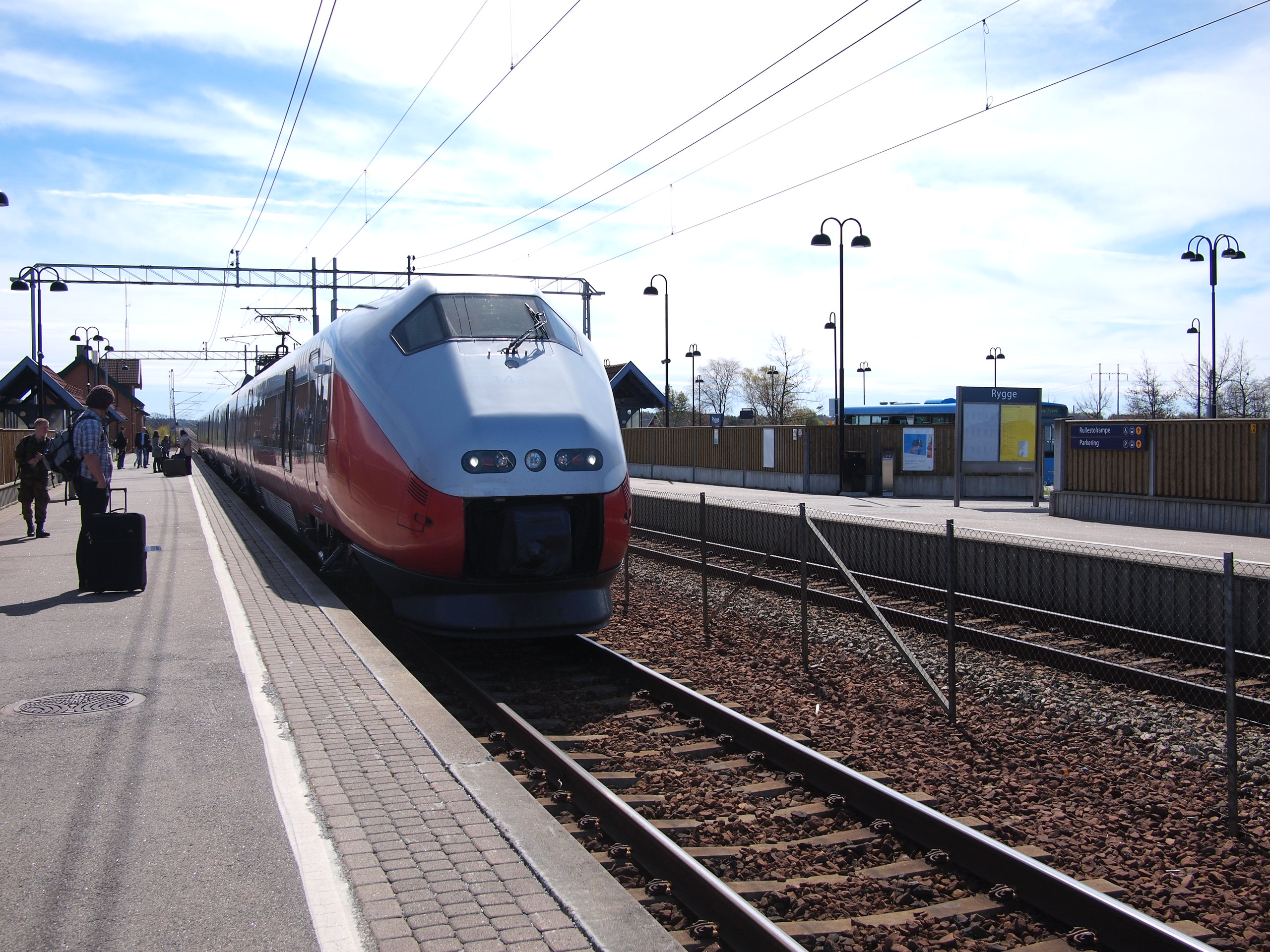 Rygge - Oslo S, Kr.124=£15 single/student